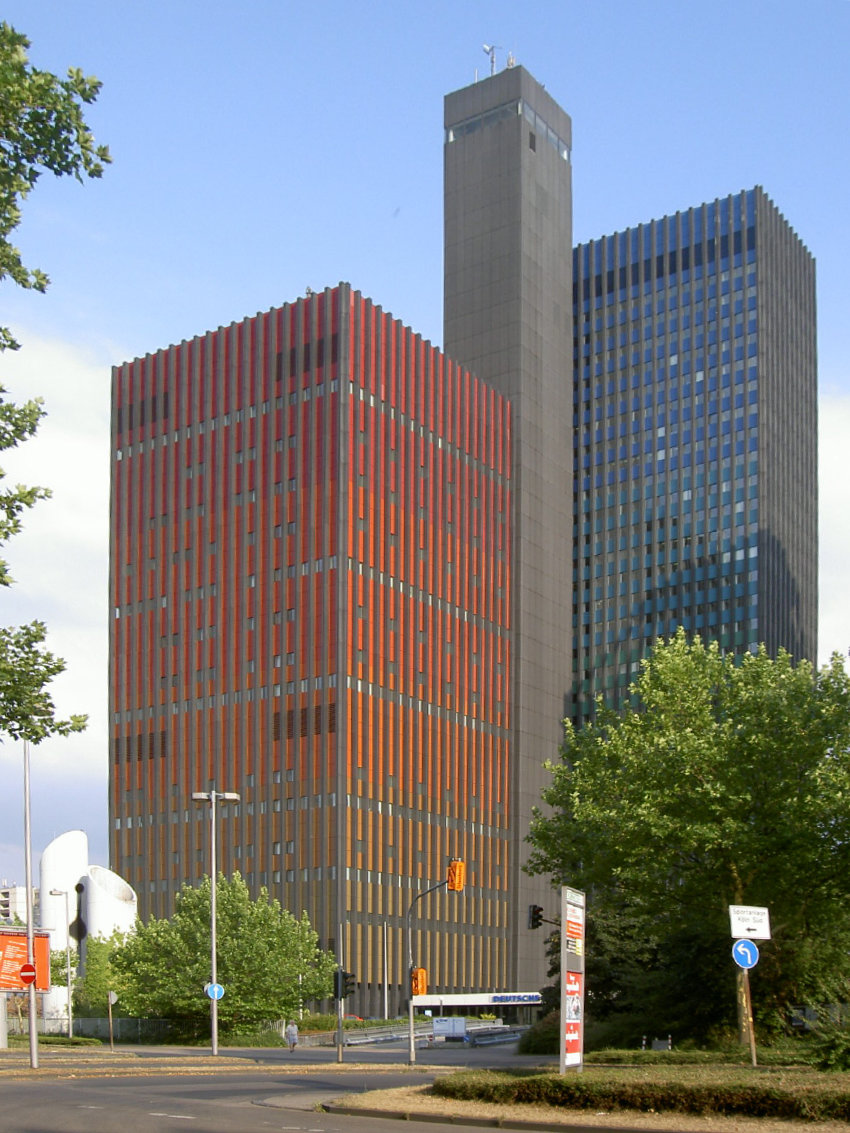 Deutsche Welle Funkhaus Am Raderberggürtel